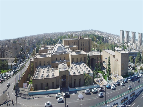 تصویر ساختمان مرکزی سازمان میراث فرهنگی، صنایع دستی و گردشگری-عکس از: استاد مهدی اکبری بکرآباد